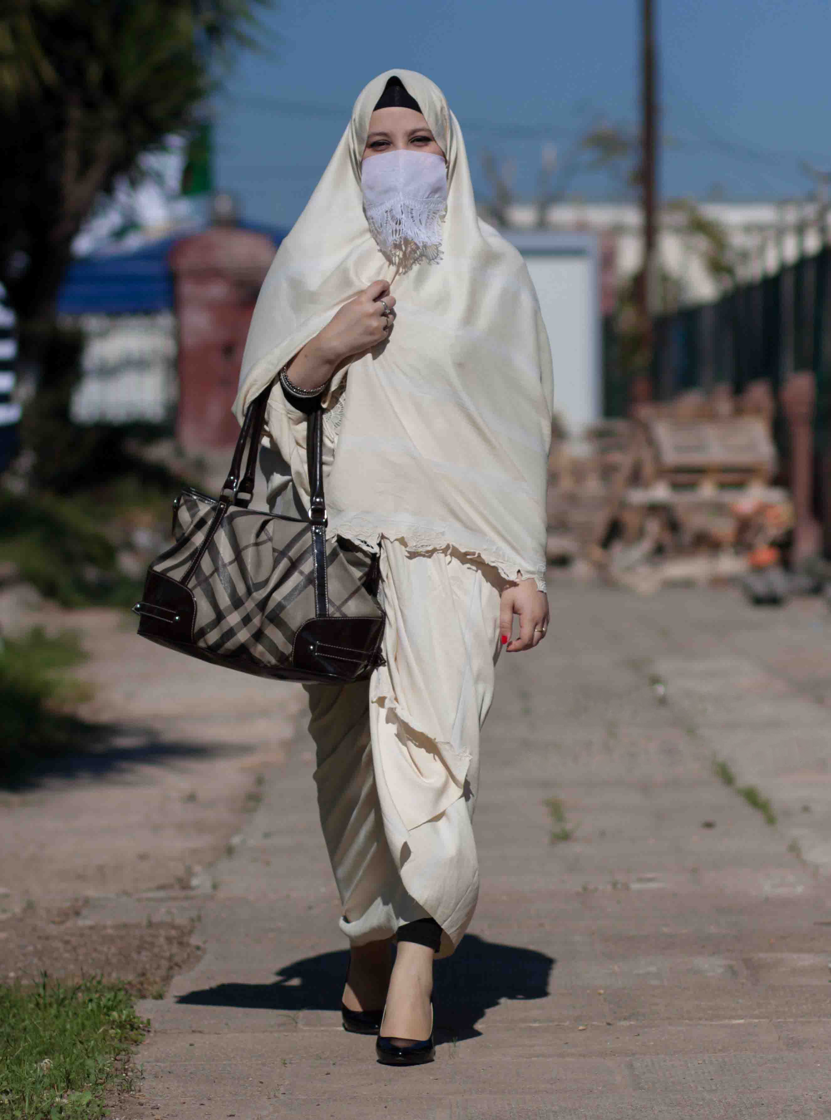 cette photo ete prise a alger grande poste This is an image of Cultural Fashion or Adornment from Algeria